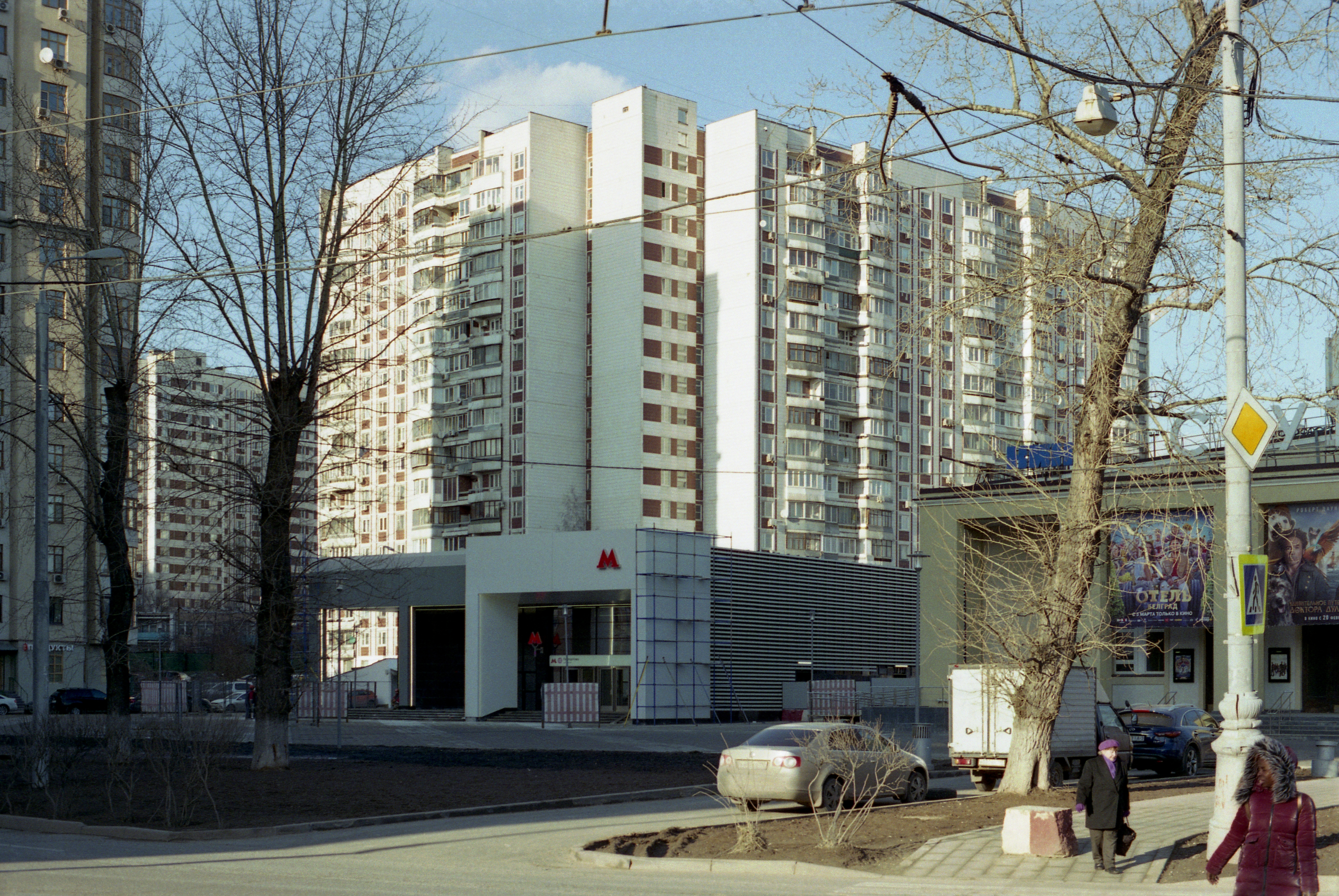 Вестибюль метро Лефортово до открытия